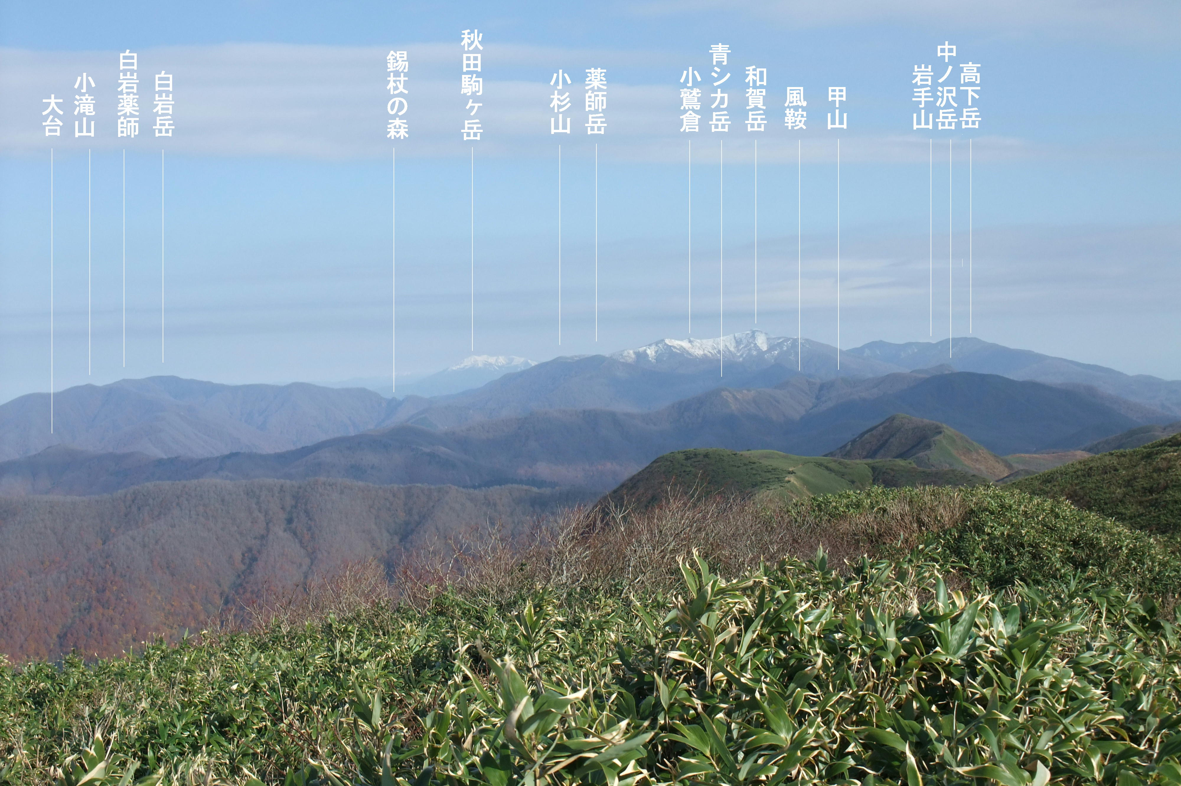 真昼岳から見た和賀岳（山名あり）